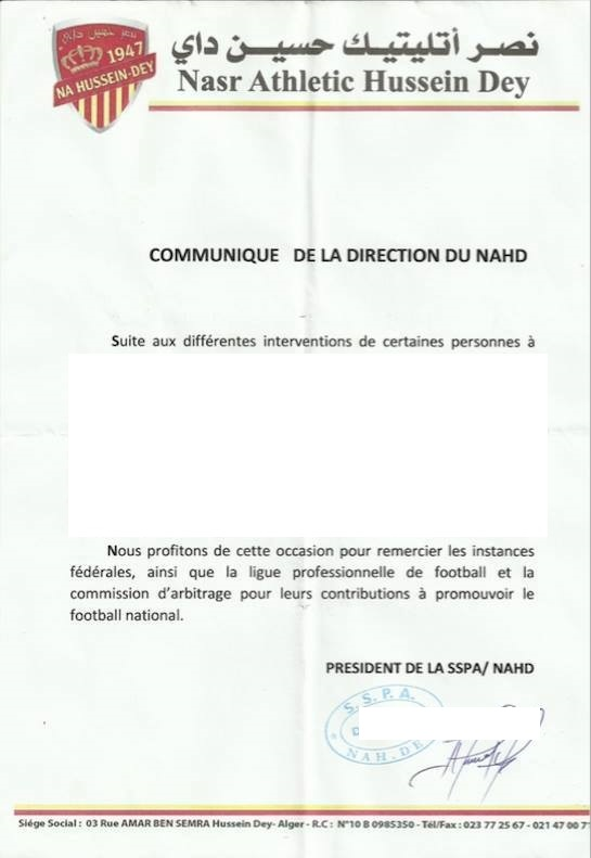 En-tête de la correspondance du NAHD